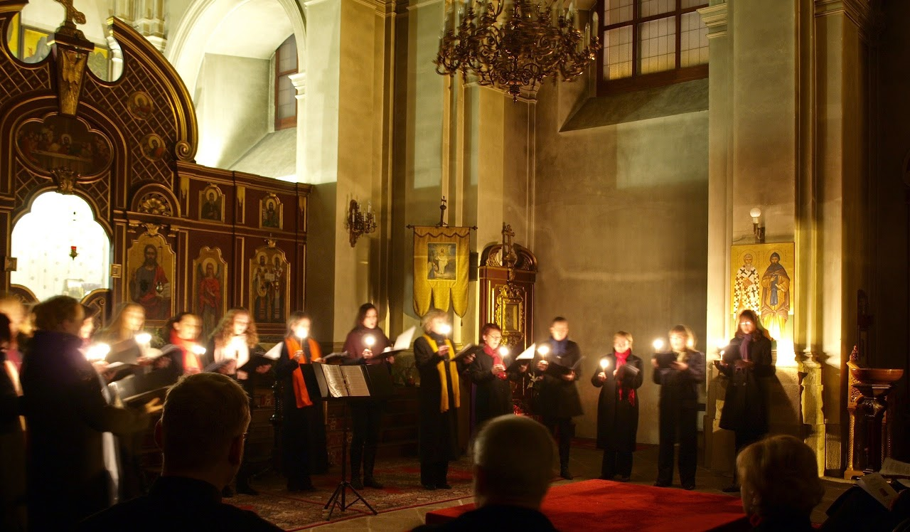 Koncert sboru Philokallia v pravoslavném chrámu svatých Cyrila a Metoděje v Praze